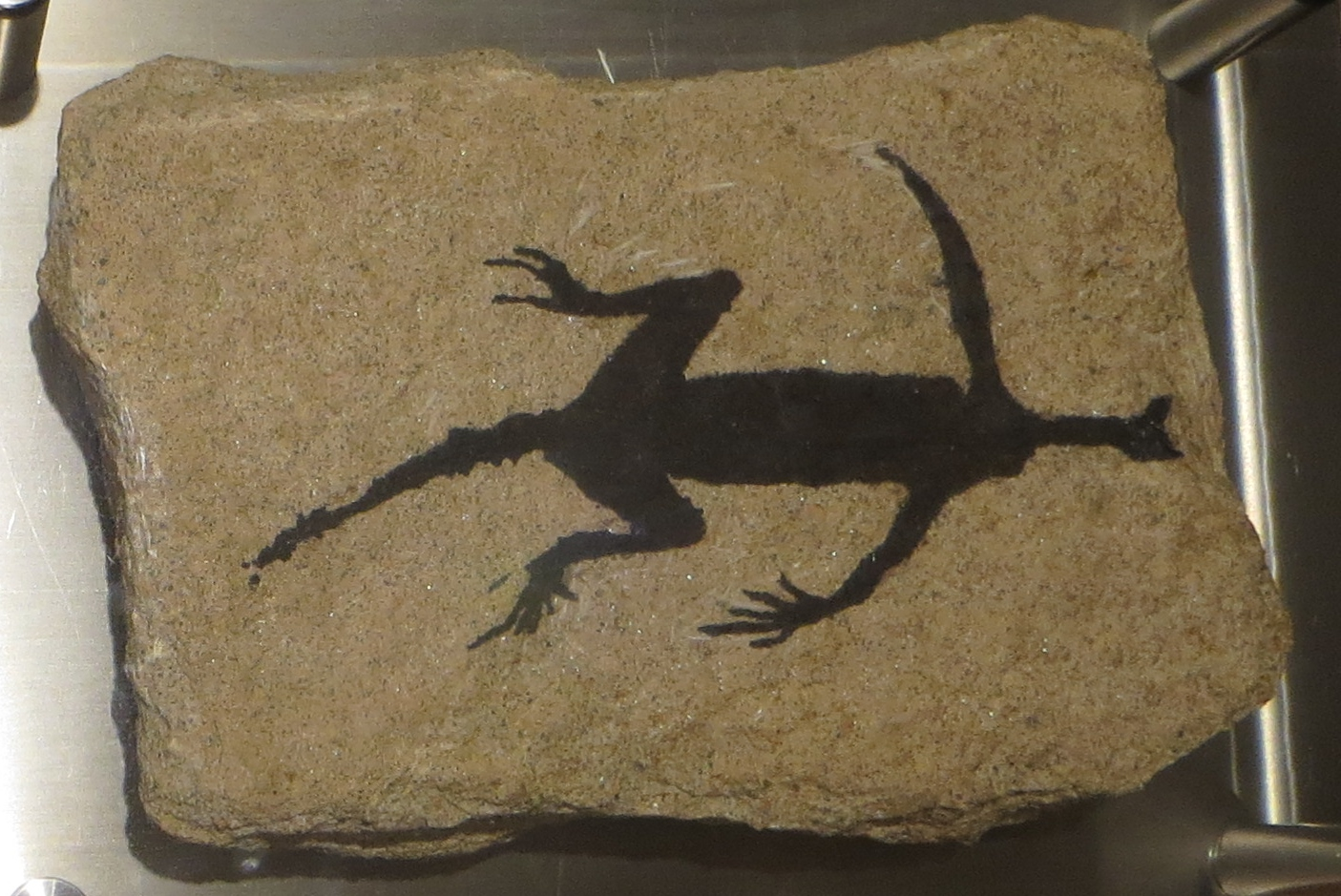 Fossil - Took the picture at Museo di Storia Naturale Bolzano